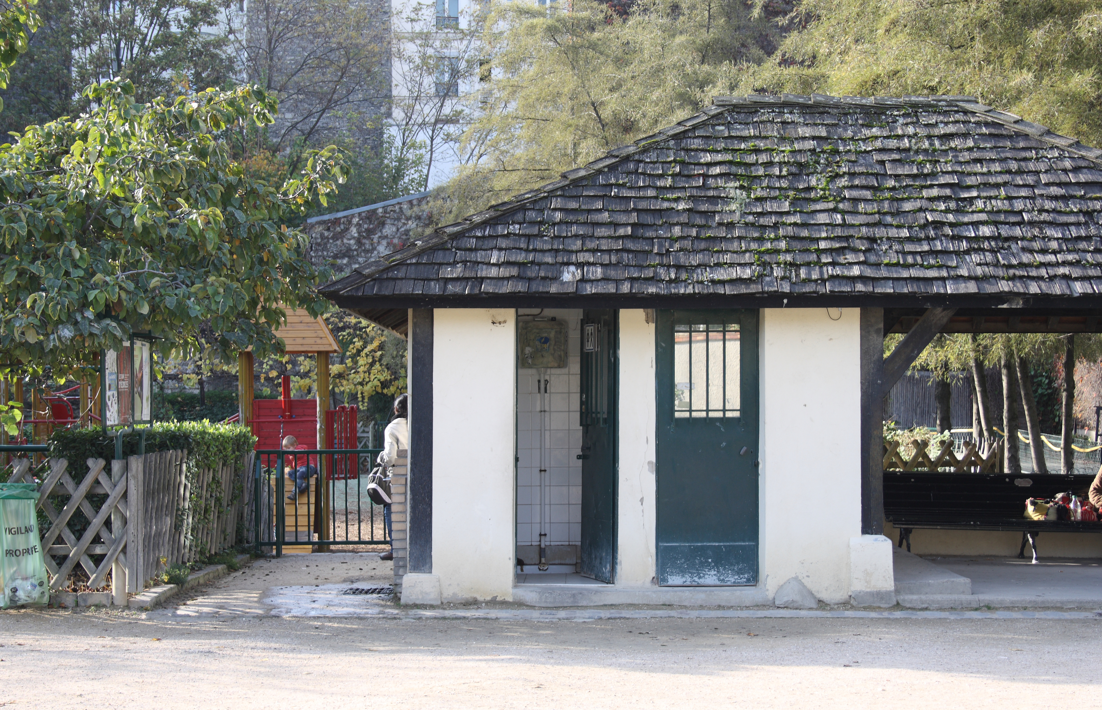 Toilettenhaus im Jardin Catherine-Labouré in Paris (7. Arrondissement)